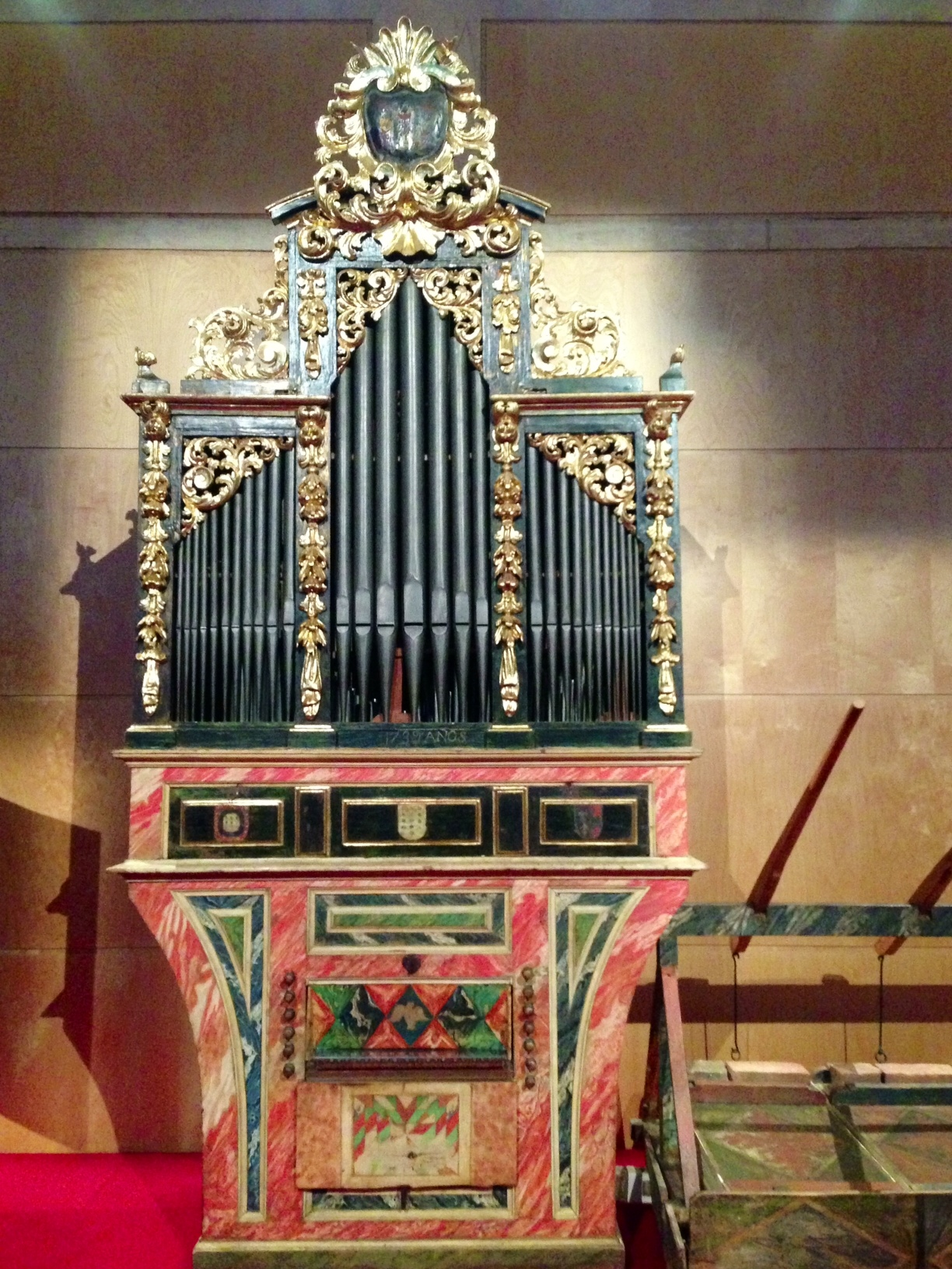 Orgue de Manuel Pérez Molero al Museu de la Música de Barcelona. MDMB 581: Orgue, D. Manuel Pérez Molero (Autor), 1719